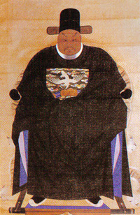 Kim Seokju